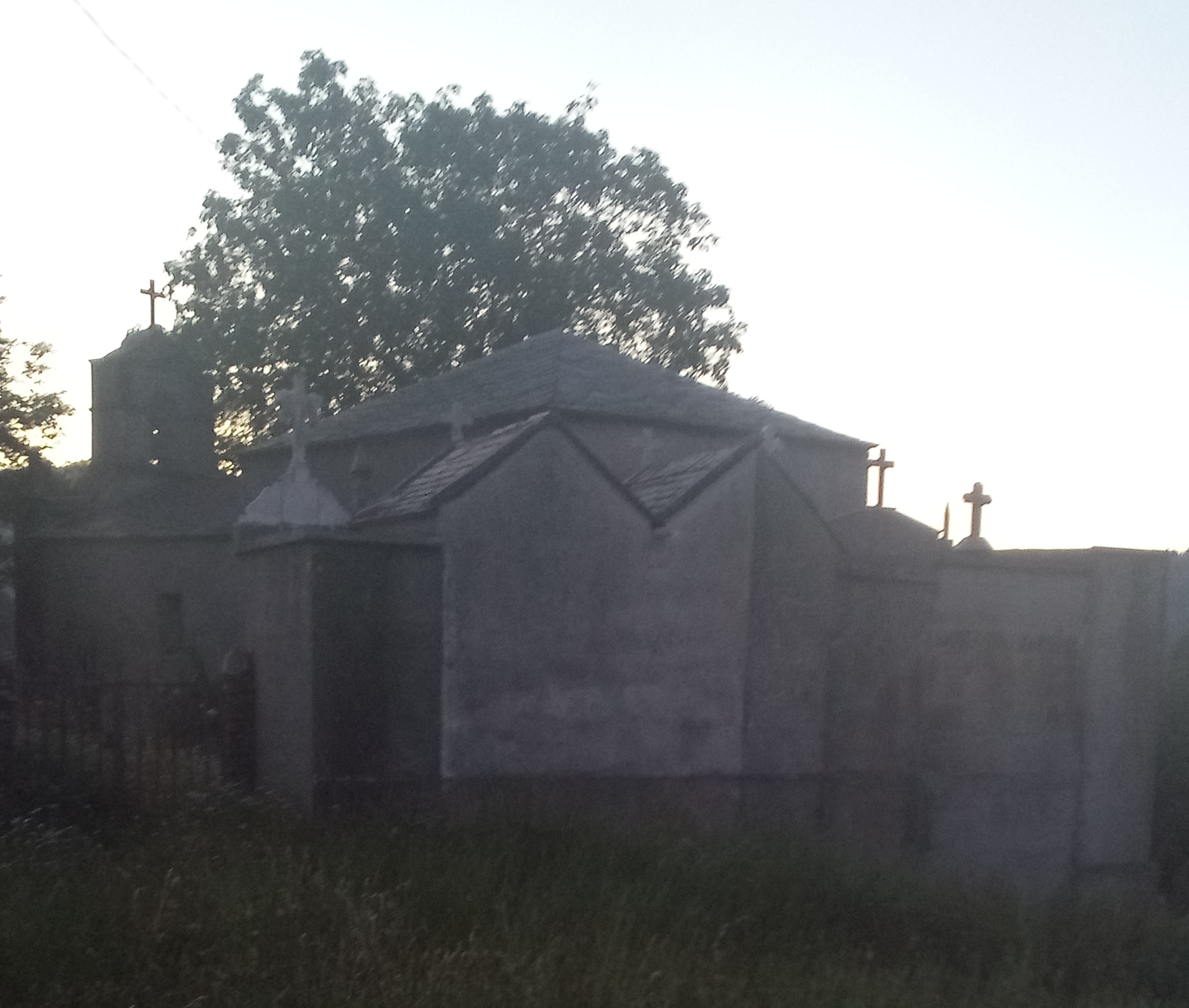 Iglesia de Guillén del século XVIII